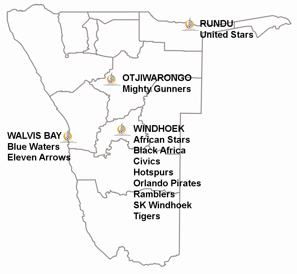 Mannschaften der Namibia Premier League 2011/12